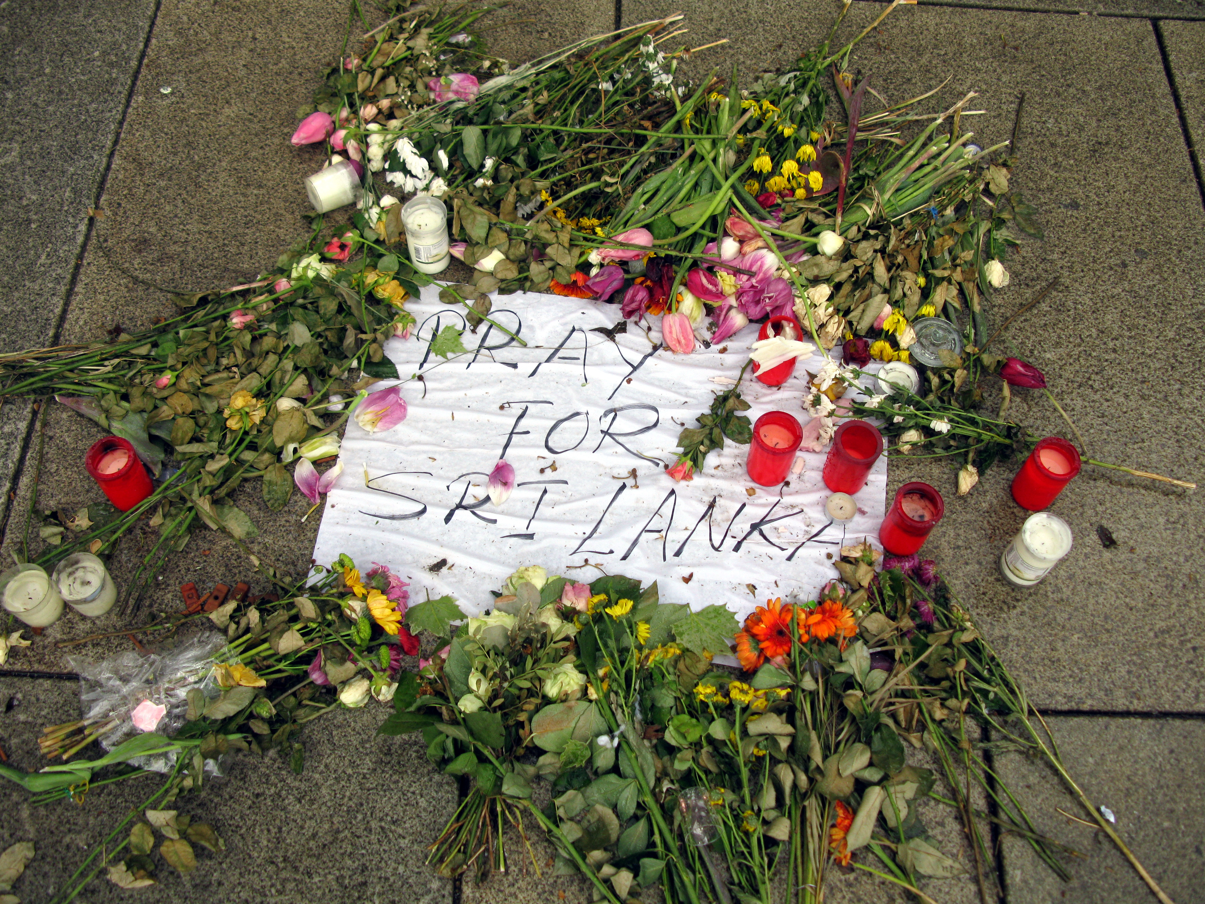 "Pray for Sri Lanka", Gedenkstelle mit Blumen und Kerzen auf dem Platz der Alten Synagoge in Freiburg, nimmt Bezug auf den Terroranschlag dort an Ostern 2019